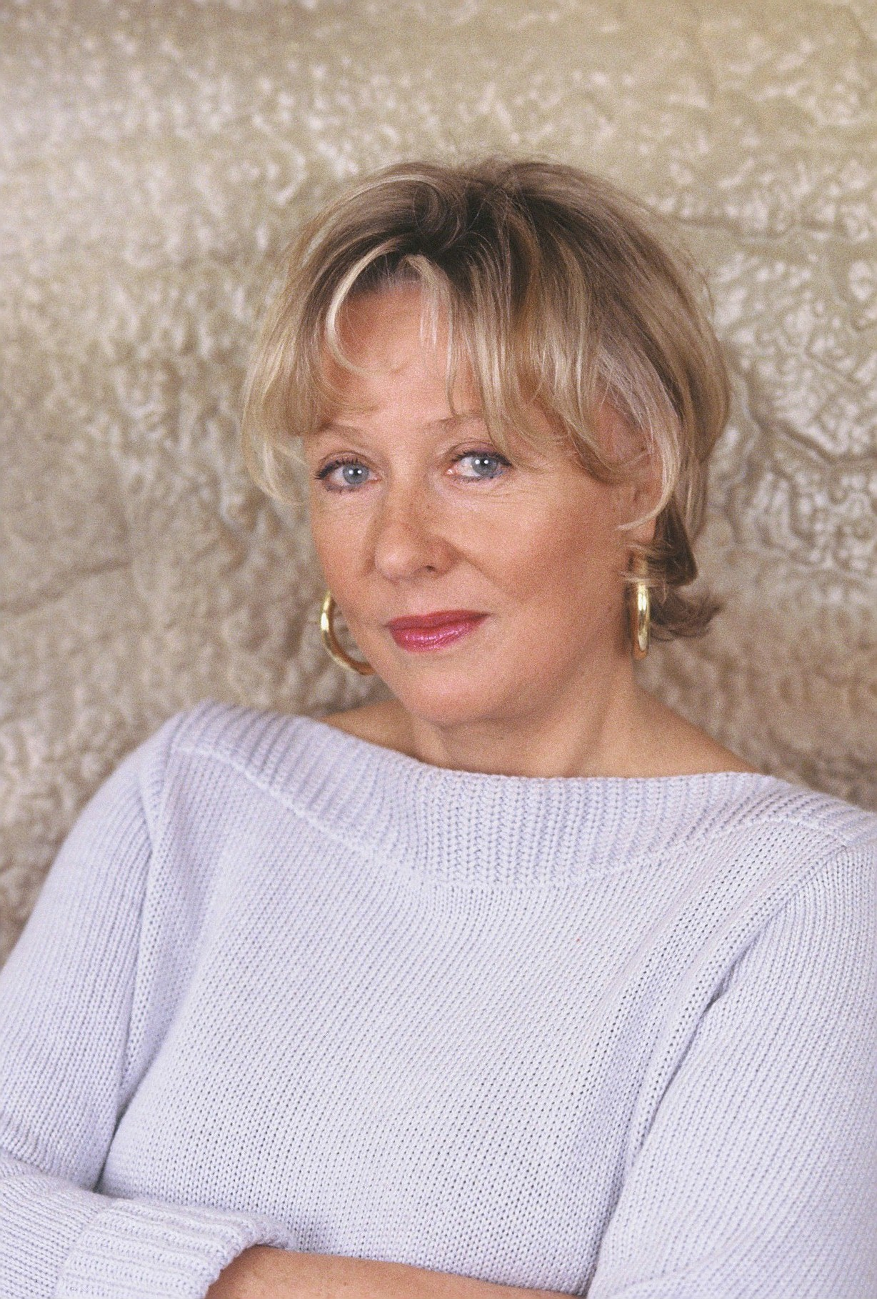 portrait